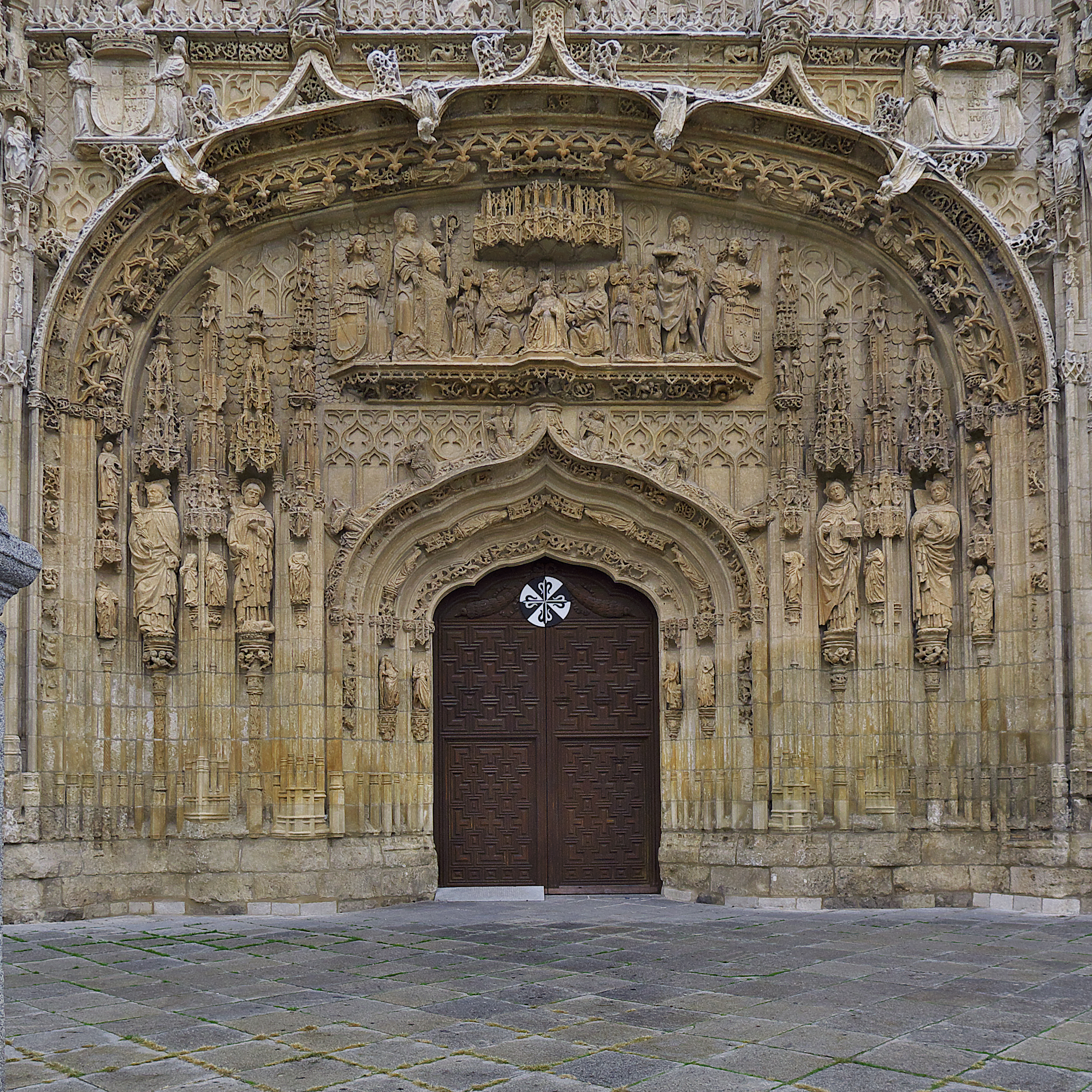 El dominico fray Alonso de Burgos (†1499), obispo de Palencia y prior de este Convento de San Pablo, contrata al maestro Simón de Colonia la portada monumental de la iglesia. Todo un programa de exaltación de la Orden de Predicadores, con el reconocimiento a los Reyes Católicos. Obra muy representativa del gótico isabelino. Alonso de Burgos engrandece su diócesis con esta edificación en Valladolid